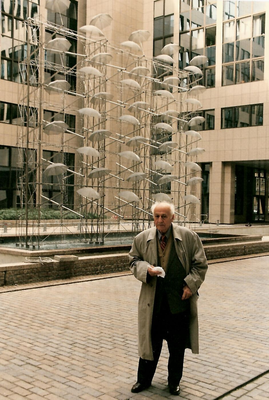 Ο Γιώργος Ζογγολόπουλος μπροστά στο υδροκινητικό έργο του "Ομπρέλες" στο κτήριο του Συμβουλίου των Υπουργών της Ευρωπαϊκής Ένωσης στις Βρυξέλλες, 1995